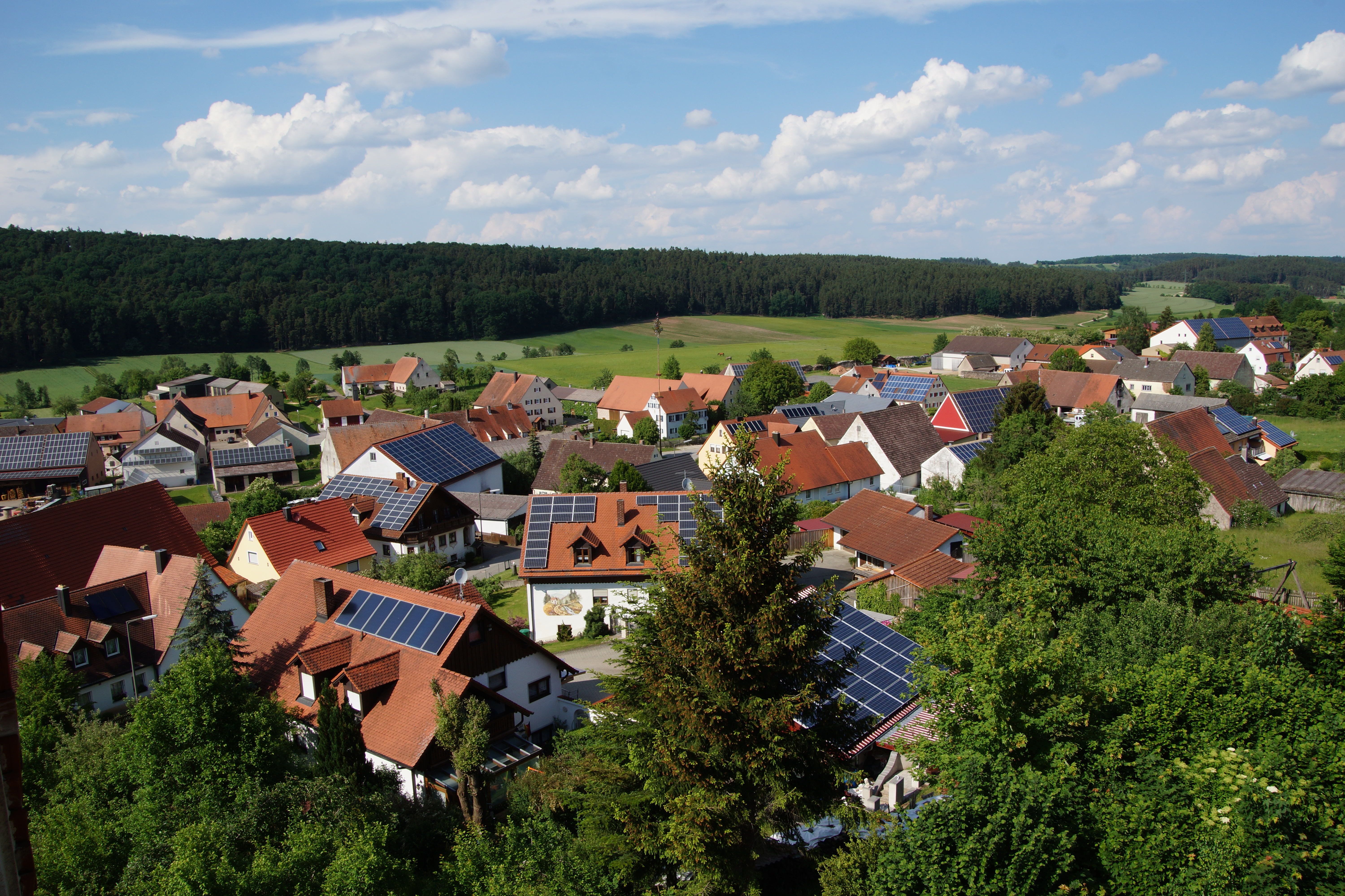 St Nikolaus in Dorsbrunn bei Pleinfeld